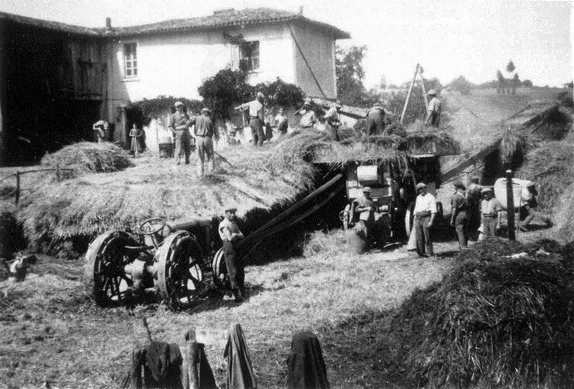 Chalon (Isère), travail de battage à la ferme en 1933.